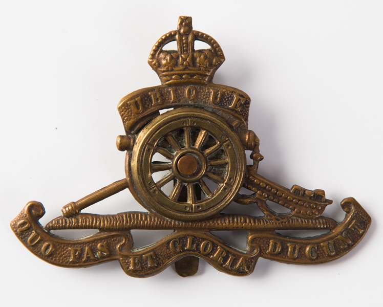 Op een rommelmarkt werd een foto van koning Albert I gekocht. De verkoper wist niet dat dit een beeltenis van Koning Albert I was. Er wordt veel belang gehecht aan deze foto omdat vermoed wordt dat dit een originele foto is, die mogelijk in Engeland werd opgenomen. Het originele aspect wordt ondersteund door de handtekening van de fotograaf op de passe partout (Engelsman Richard N. Spraight, gefotografeerd in Engeland). De grootvader (langs vaderskant) van de geïnterviewde is Jozef Petré. Jozef is na de val van Antwerpen naar Engeland gevlucht in 1914 samen met zijn vrouw en hun eerste zoon Emile Petré die toen 3 jaar oud was. Zij hebben in Engeland gewerkt in de oorlogsindustrie. Zij woonden daar met andere Belgen in kampen. Albert Petré (vader van Armand Petré) werd in Engeland geboren in 1915 in Baildon (N-Engeland) als tweede zoon in het gezin. De familie is teruggekeerd naar België tijdens het begin van de jaren twintig. Zij zijn op de Elsdonck te Wilrijk gaan wonen. Een insigne van het wijkcomité van Elsdonck is bij de meegebrachte items terug te vinden. Naast het verhaal van grootvader brengt Armand Petré een groot rood fotoboek mee uit 1933-1934. Soldaten konden het Gulden boek der Vuurkaart aanschaffen tegen 285 frank. Grootvader Paulus langs moederskant is oorloginvalide met een houten been. Nochtans komt hij niet voor in dit boek, alhoewel hij minstens 9 maanden aan het front heeft gestreden. Het Gulden boek der Vuurkaart draagt op de eerste pagina een foto en de naam van Francois Meulemans. Interessant is dat samen met dit Gulden Boek ook andere oorlogsdocumenten van deze persoon mee verzameld zijn nl. Carte de Pécule op naam van Francois Meulemans, Livret de Mobilisation van Francois Meulemans, Carnet de notes de sous-officier Meulemans (Francois, Louis, Charles)engagé en 1915.